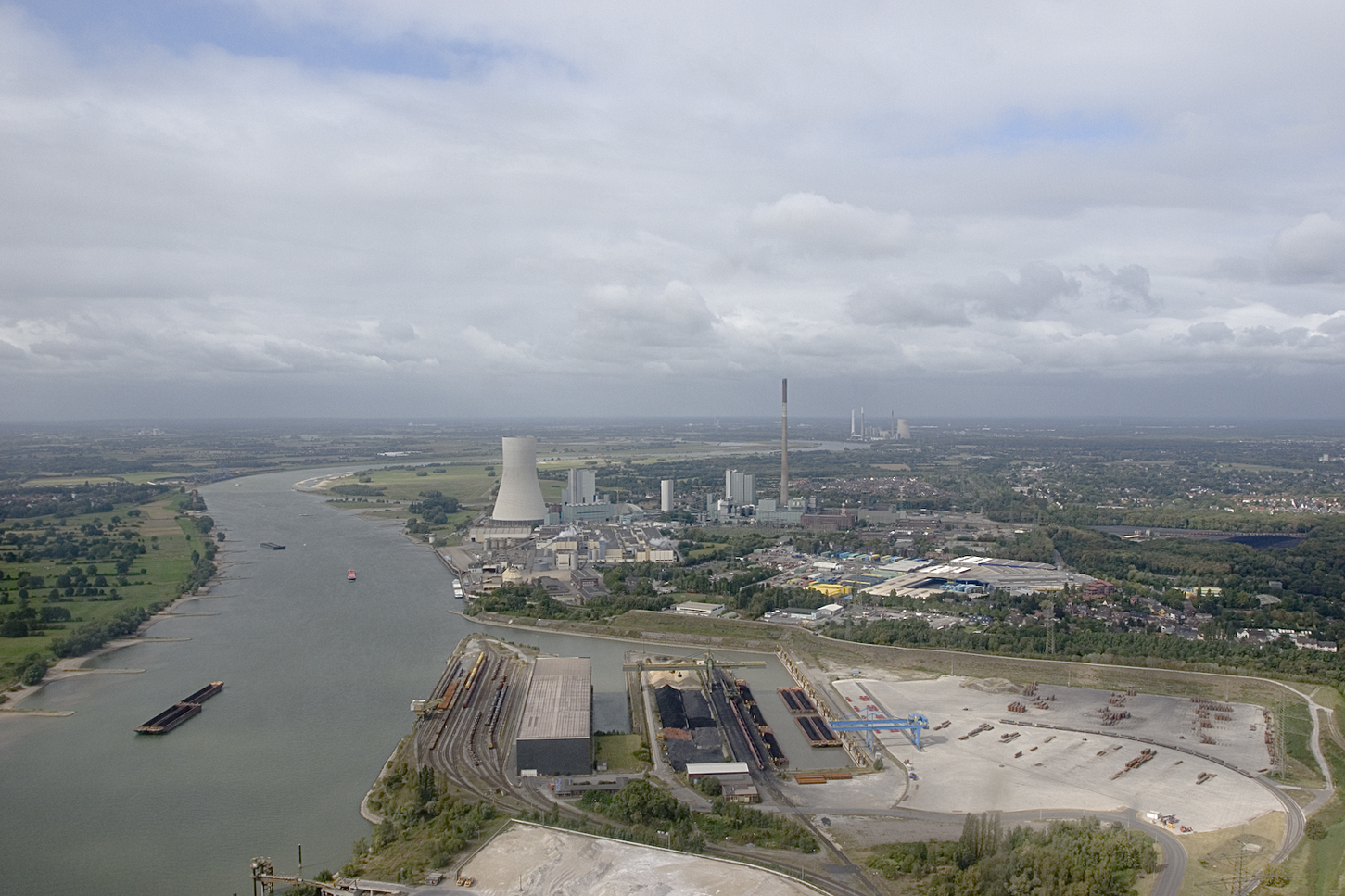 Kraftwerk Duisburg-Walsum, Luftaufnahme vom September 2009, im Vordergrund der Südhafen Walsum, im Hintergrund das Kraftwerk Voerde